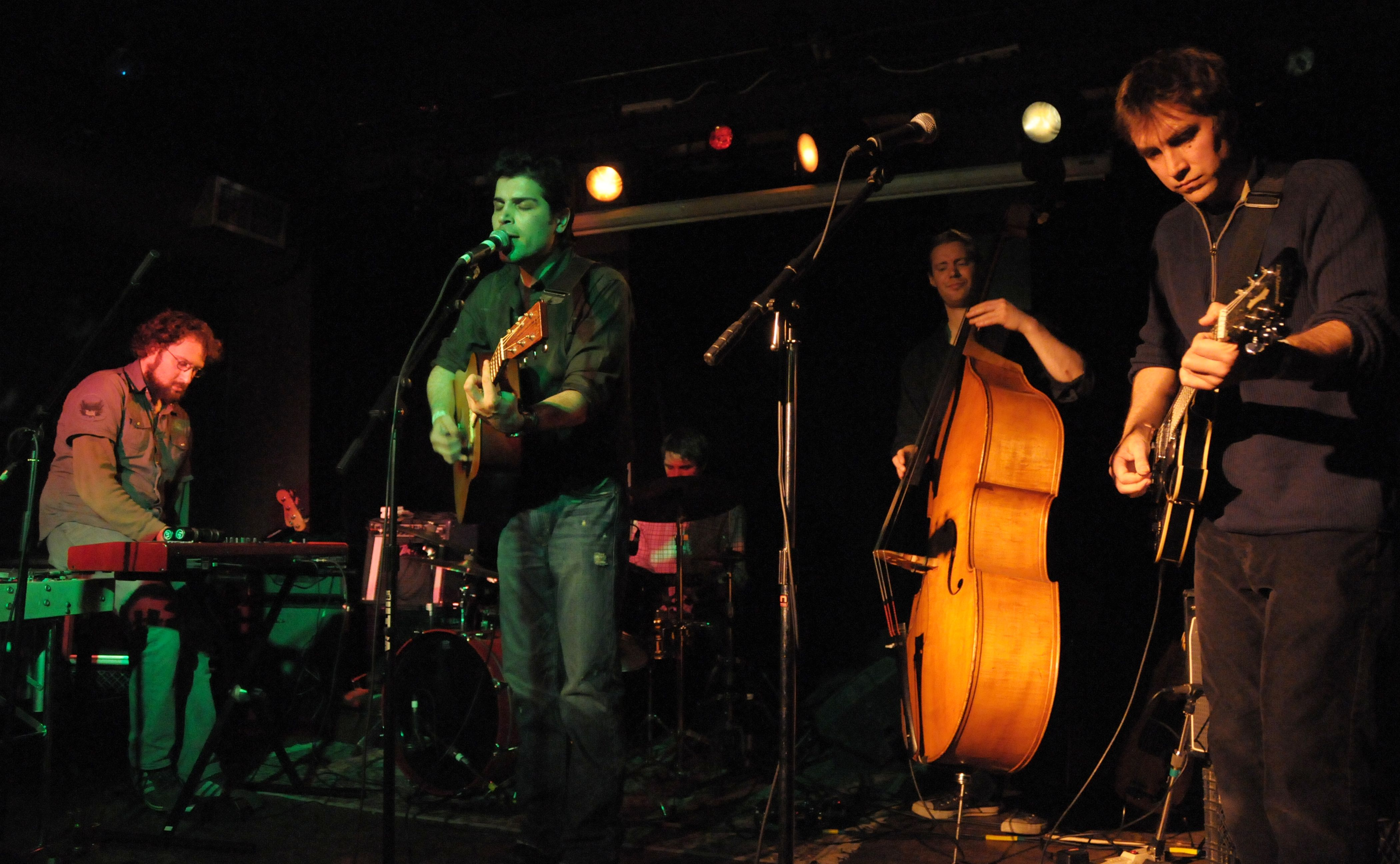 Barzin-Band-DSC_8725